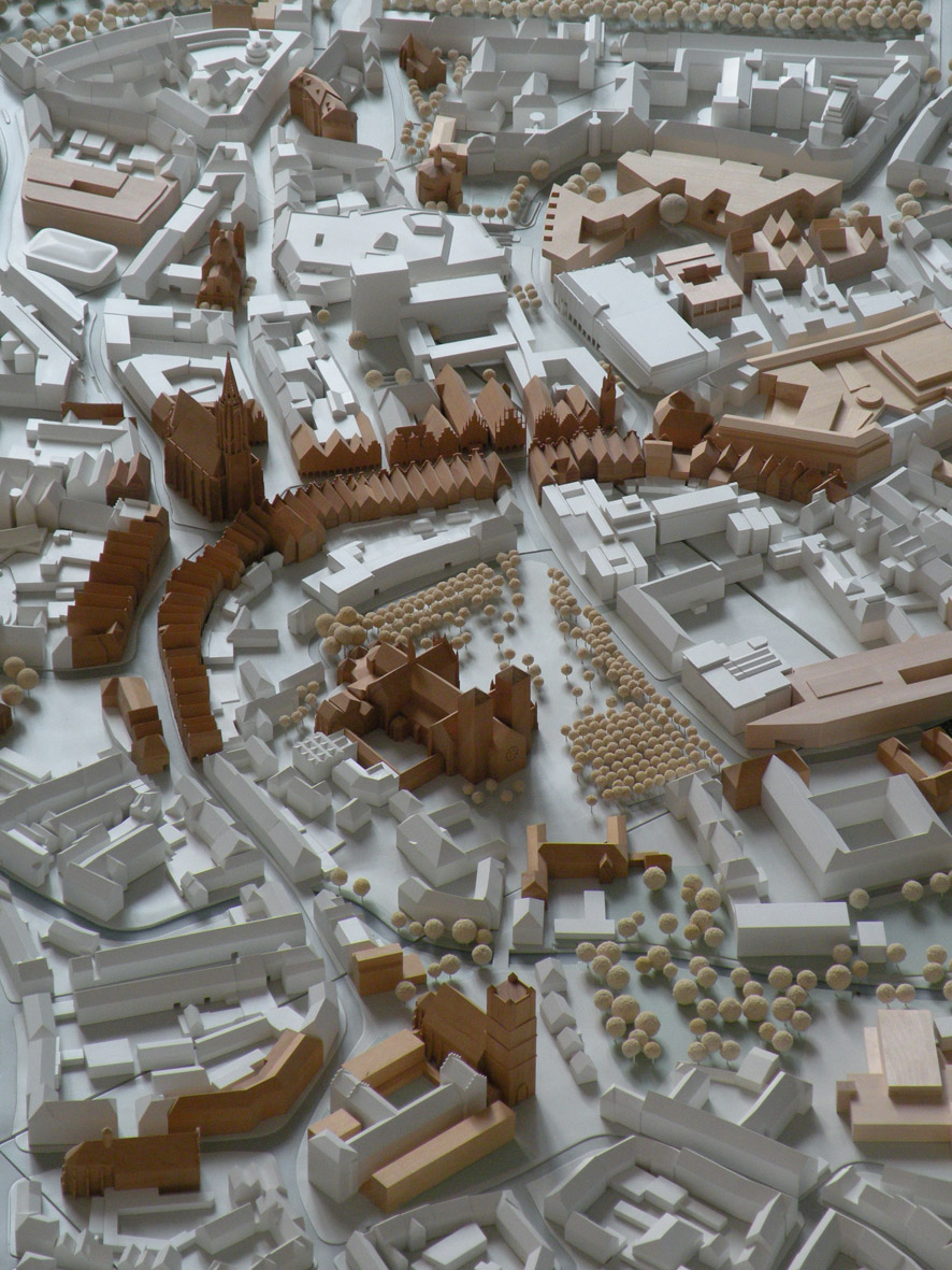 Stadtmodell: Die Altstadt im Detail